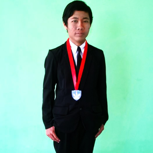 keren